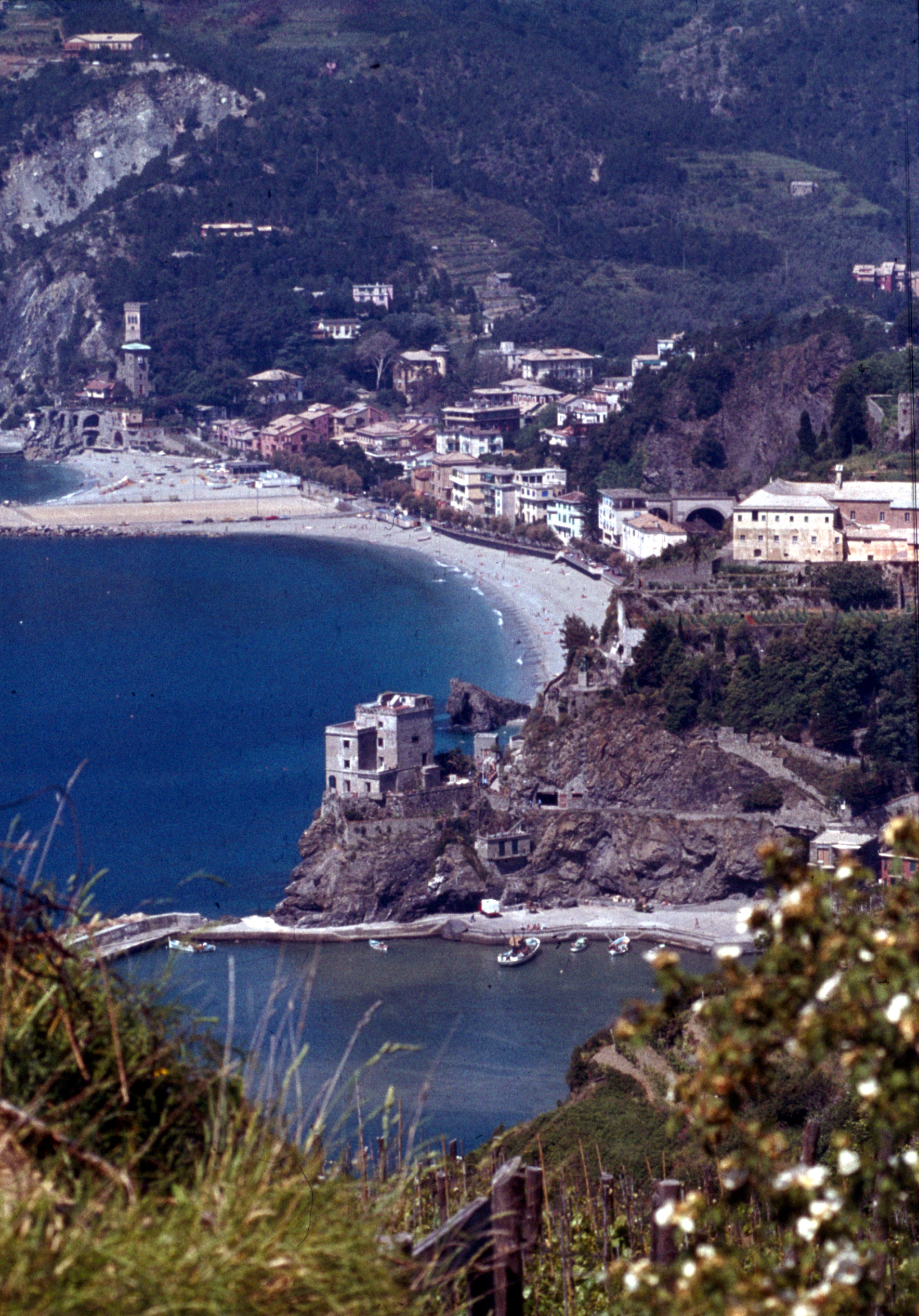 Monterosso al Mare